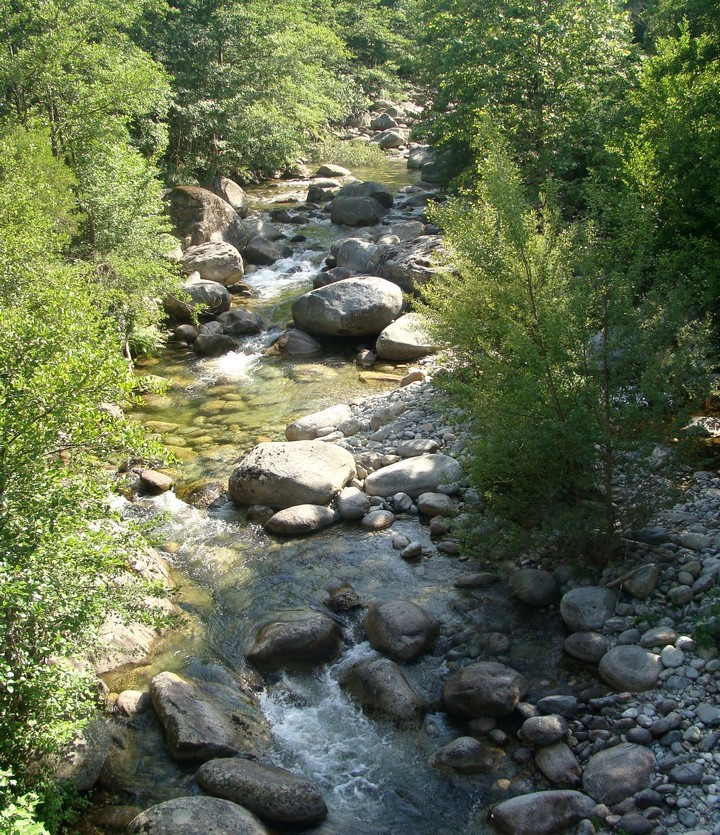 L'Abatesco au pied du village de Pietrapola (commune d'Isolaccio-di-Fiumorbo).